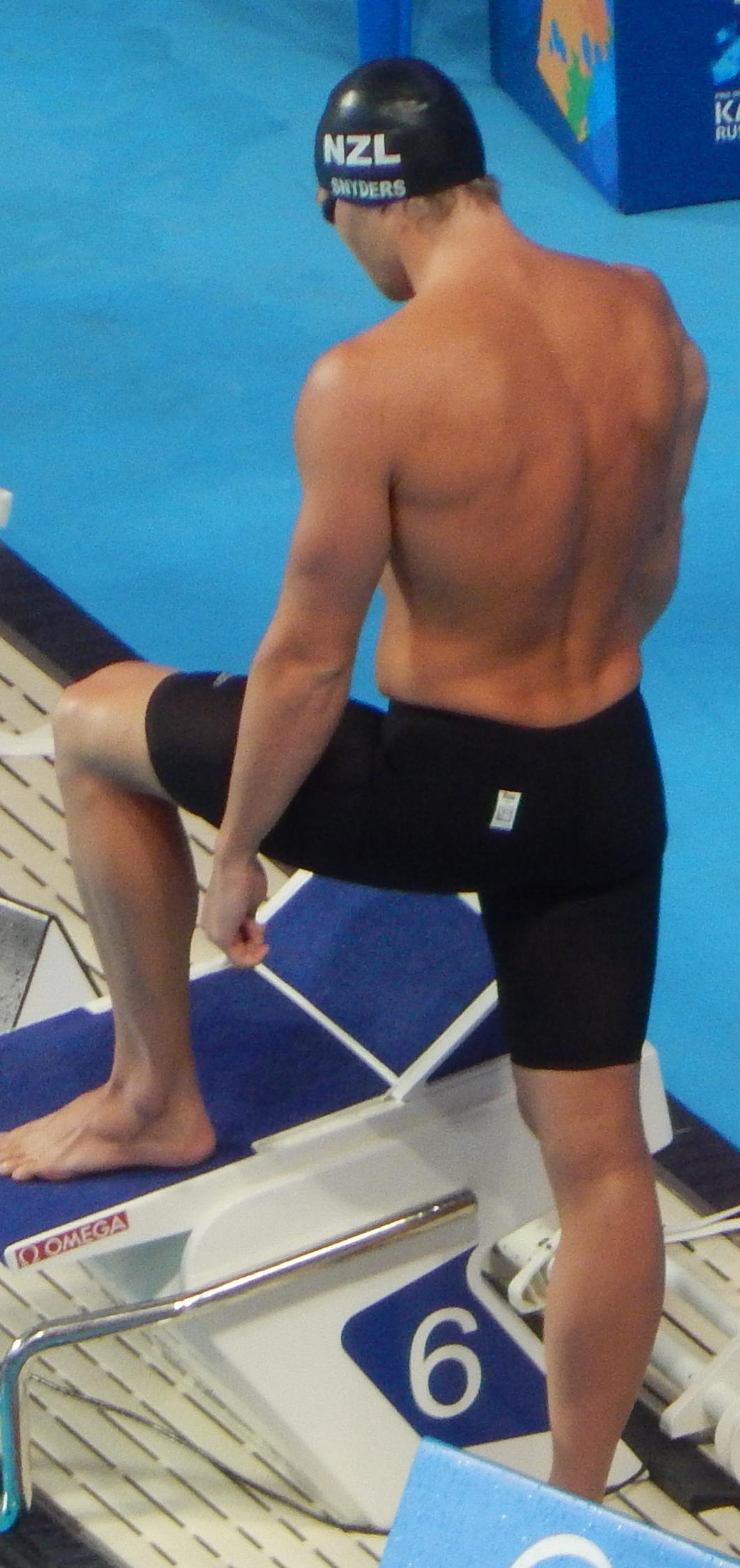 Гленн Снайдерс на дистанции 50 метров брассом у мужчин в Казани